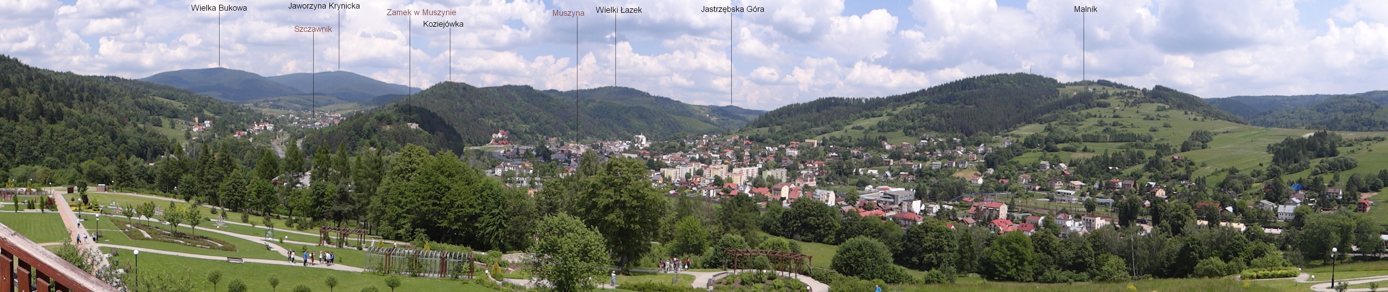 Panorama z wieży widokowej w Muszynie